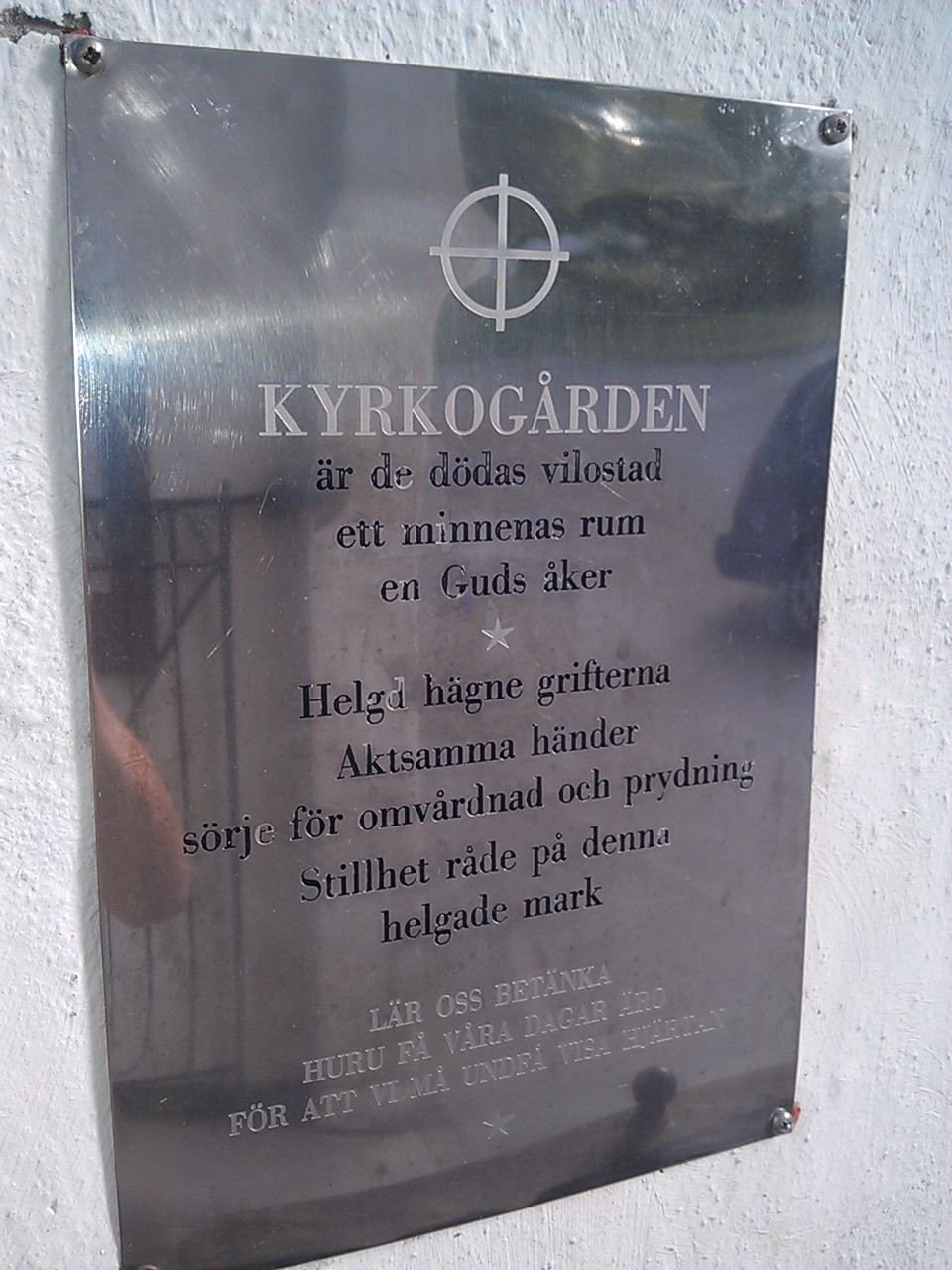 Från Lundby gamla kyrka i Göteborg